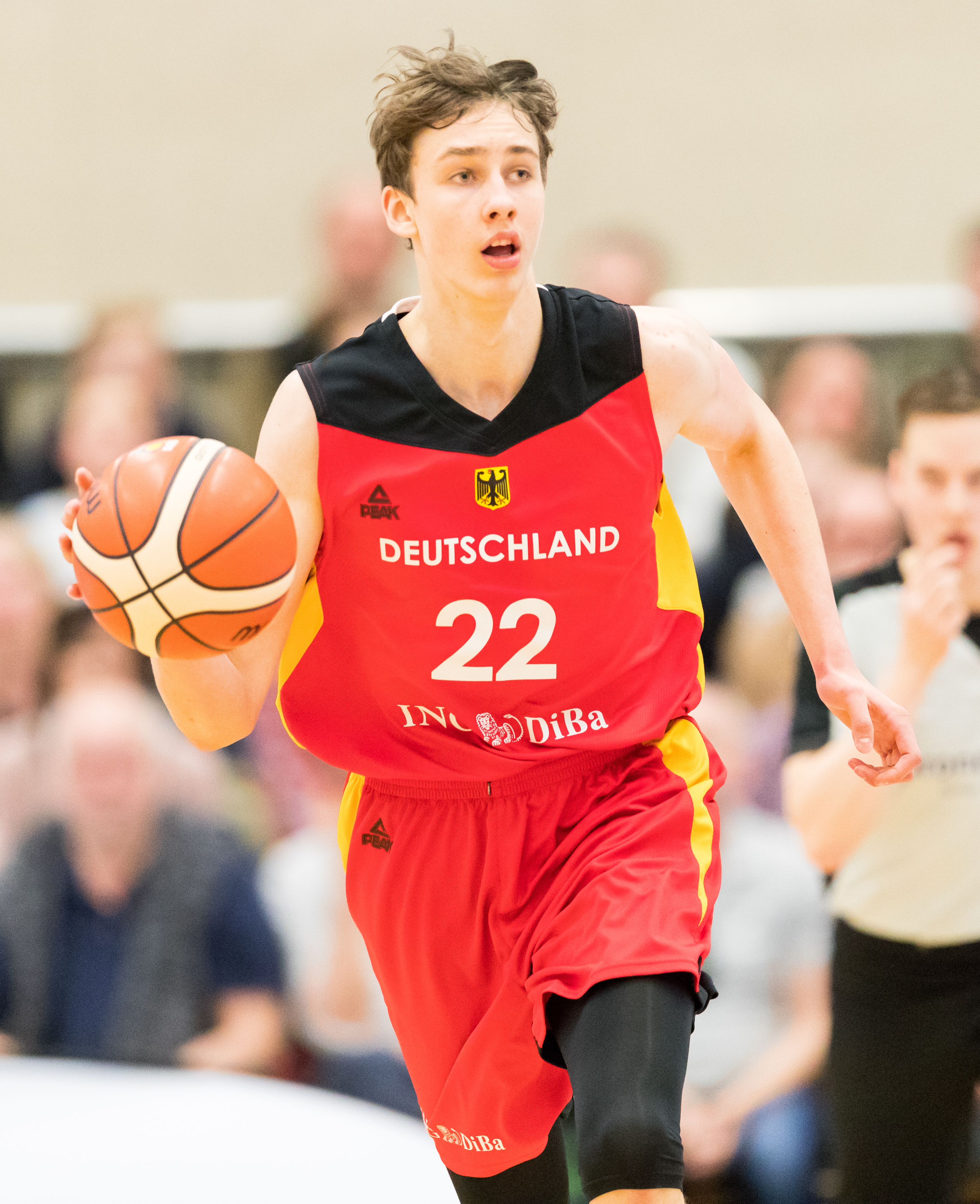 Germany vs Russia 80:75 during semi-final Basketball Albert Schweitzer Turnier at GBG Halle, Mannheim, Baden-Württemberg, Germany on 2018-04-06, Photo: Sven Mandel